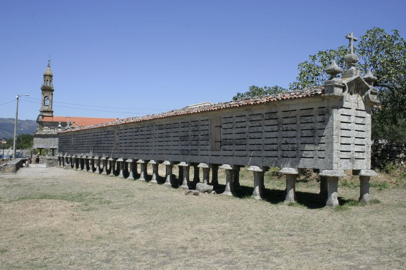 Hórreo, Carnota. XVIII